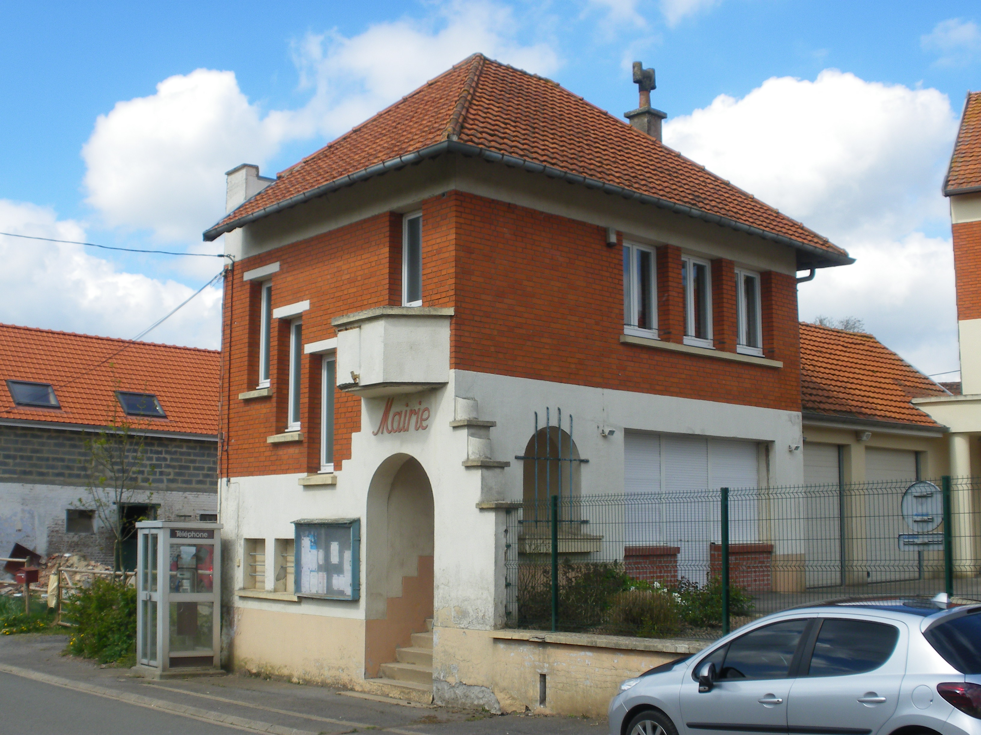 Vue de la mairie de Beaufort-Blavincourt.